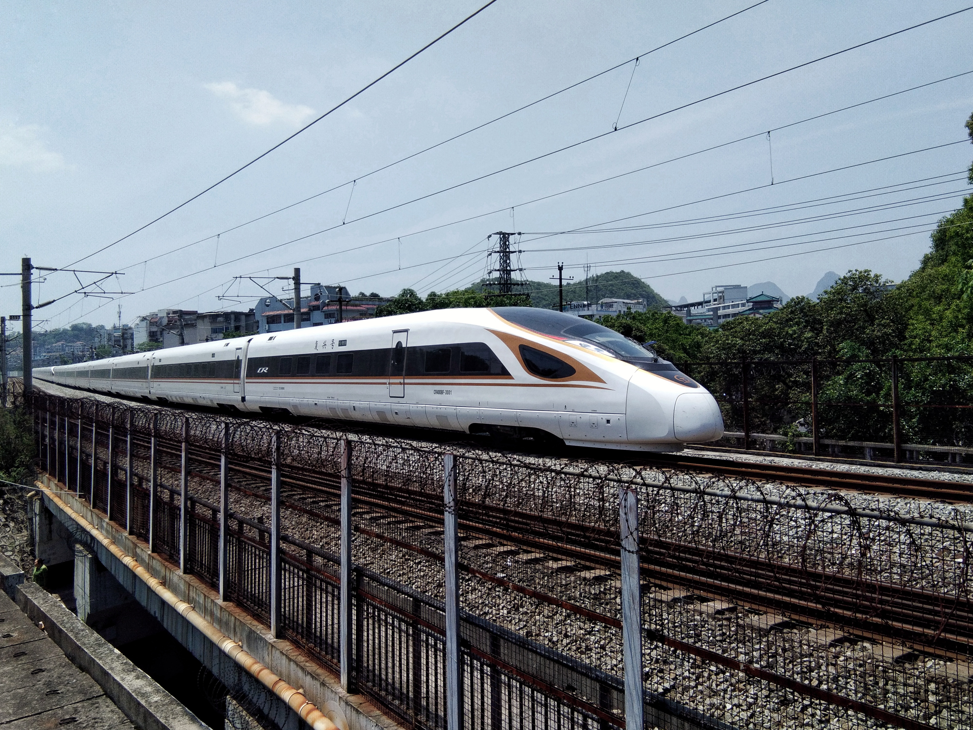 中文（中国大陆）: CR400BF-3001与CR400BF-3002重联编组的G1504次列车通过桂林丽君路铁路桥